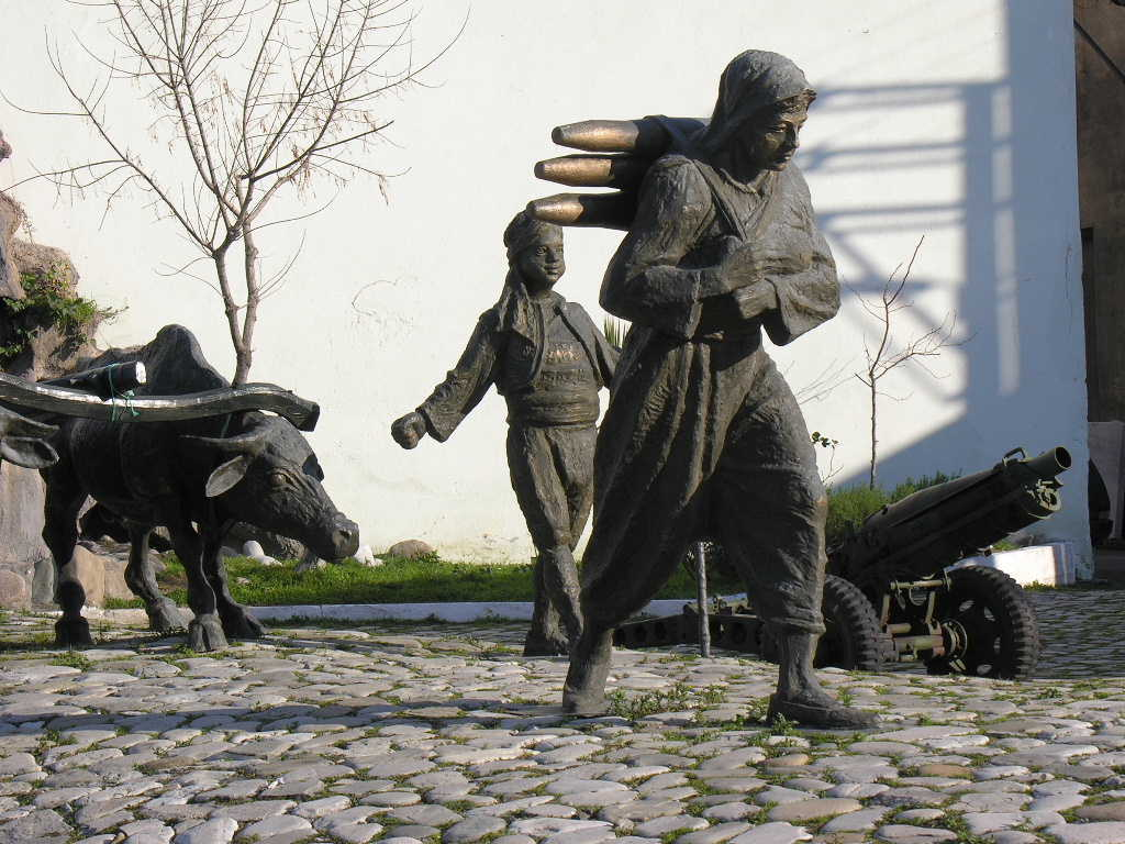 Şehit Şerife Bacı Anıtı, İnebolu